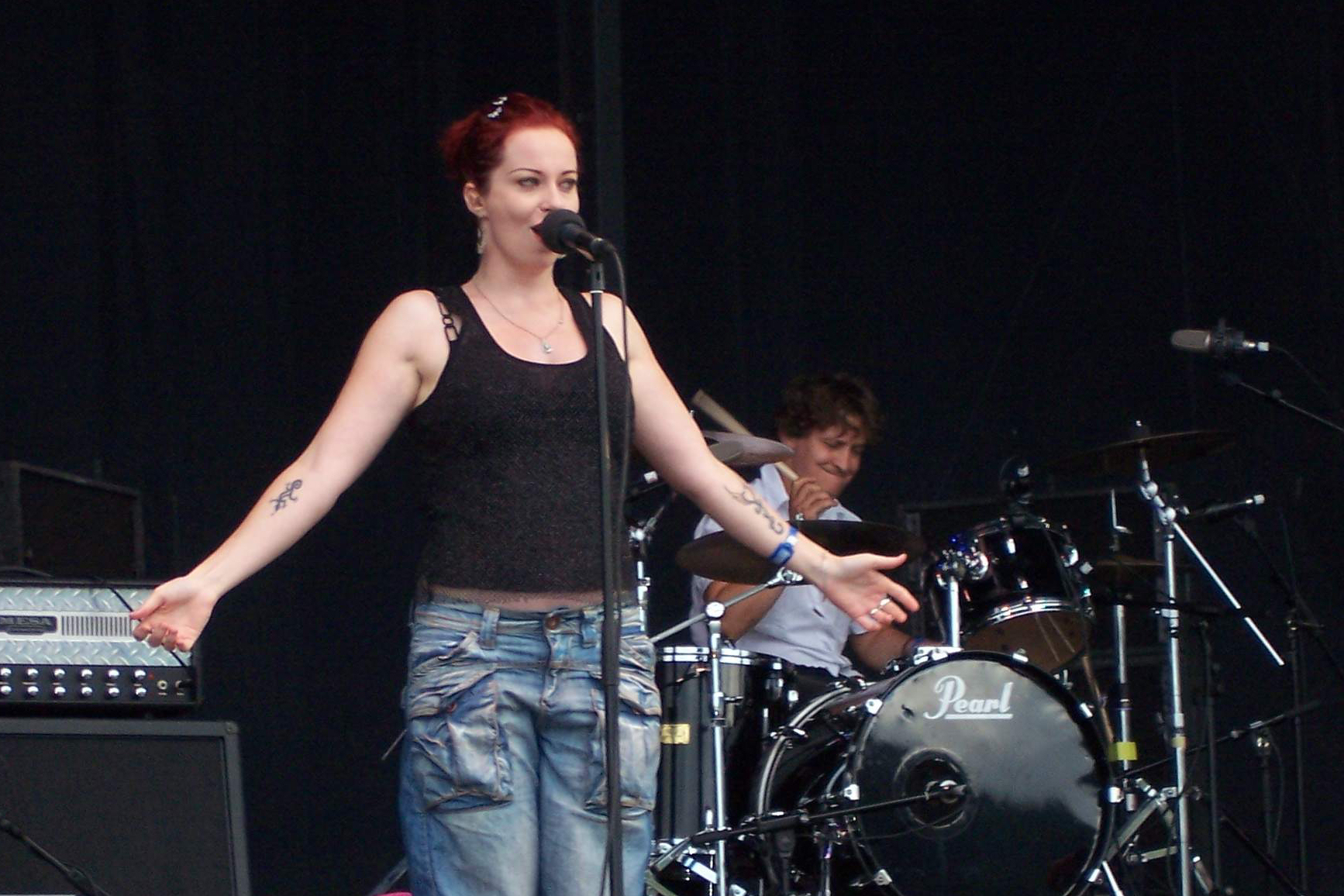 Anneke van Giersbergen at the Metalway